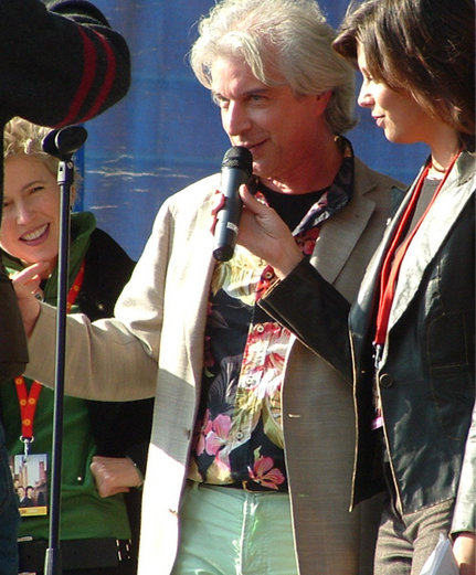 Boudewijn de Groot met Andrea Croonenberghs en Evy Gruyaert op Flikkendag 2004 in Gent.